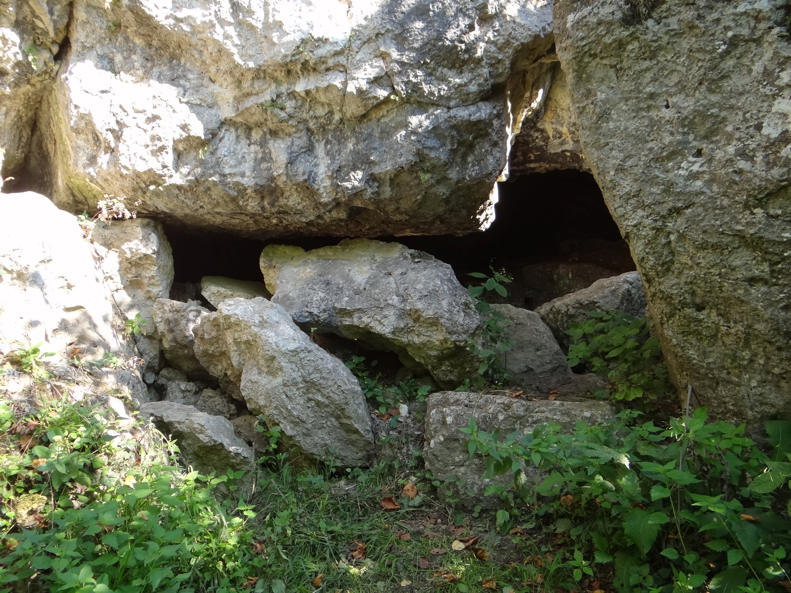 Jaskinia na Wrzosach Południowa